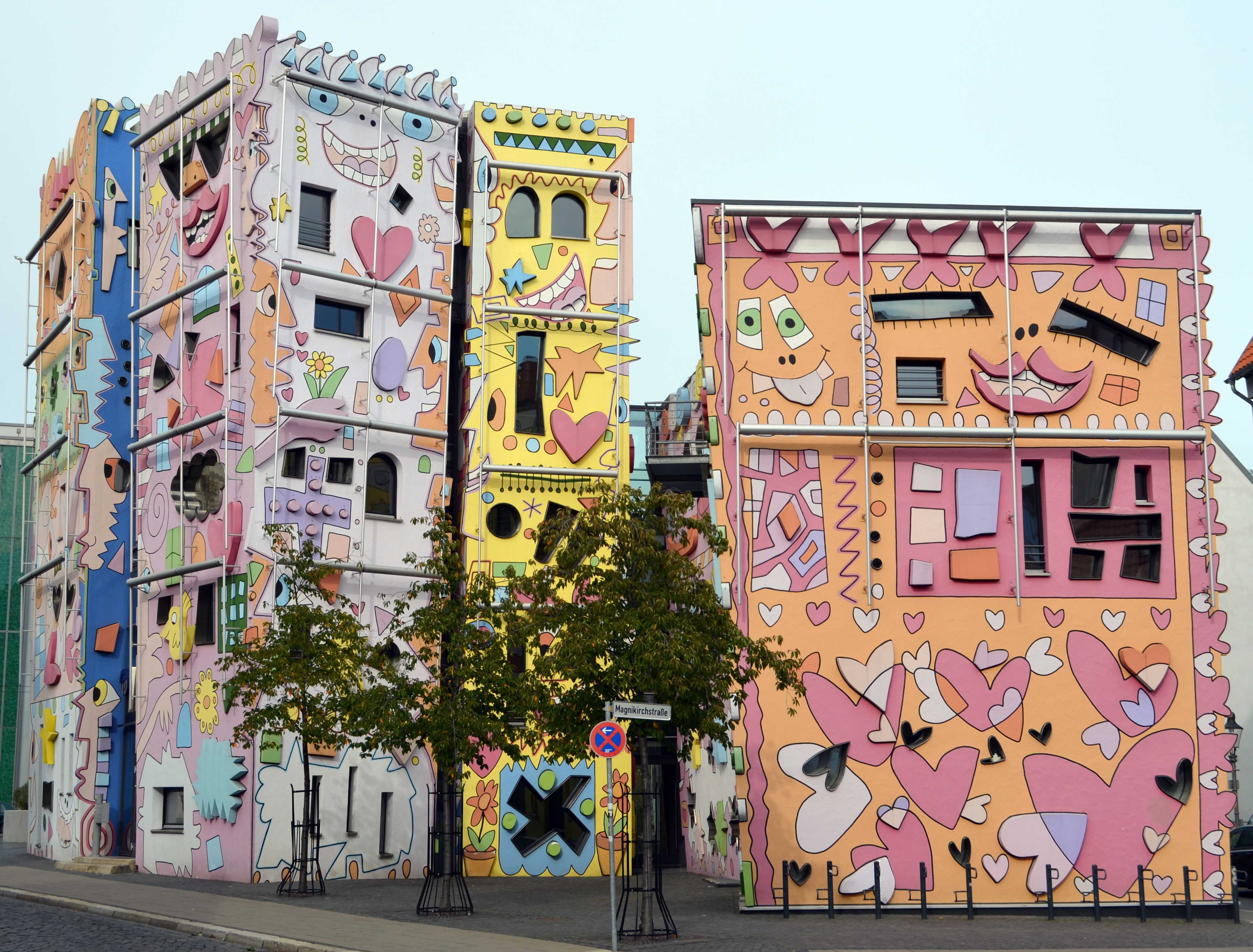 Braunschweig (Magniviertel): Happy RIZZI House vom Ackerhof aus gesehen.